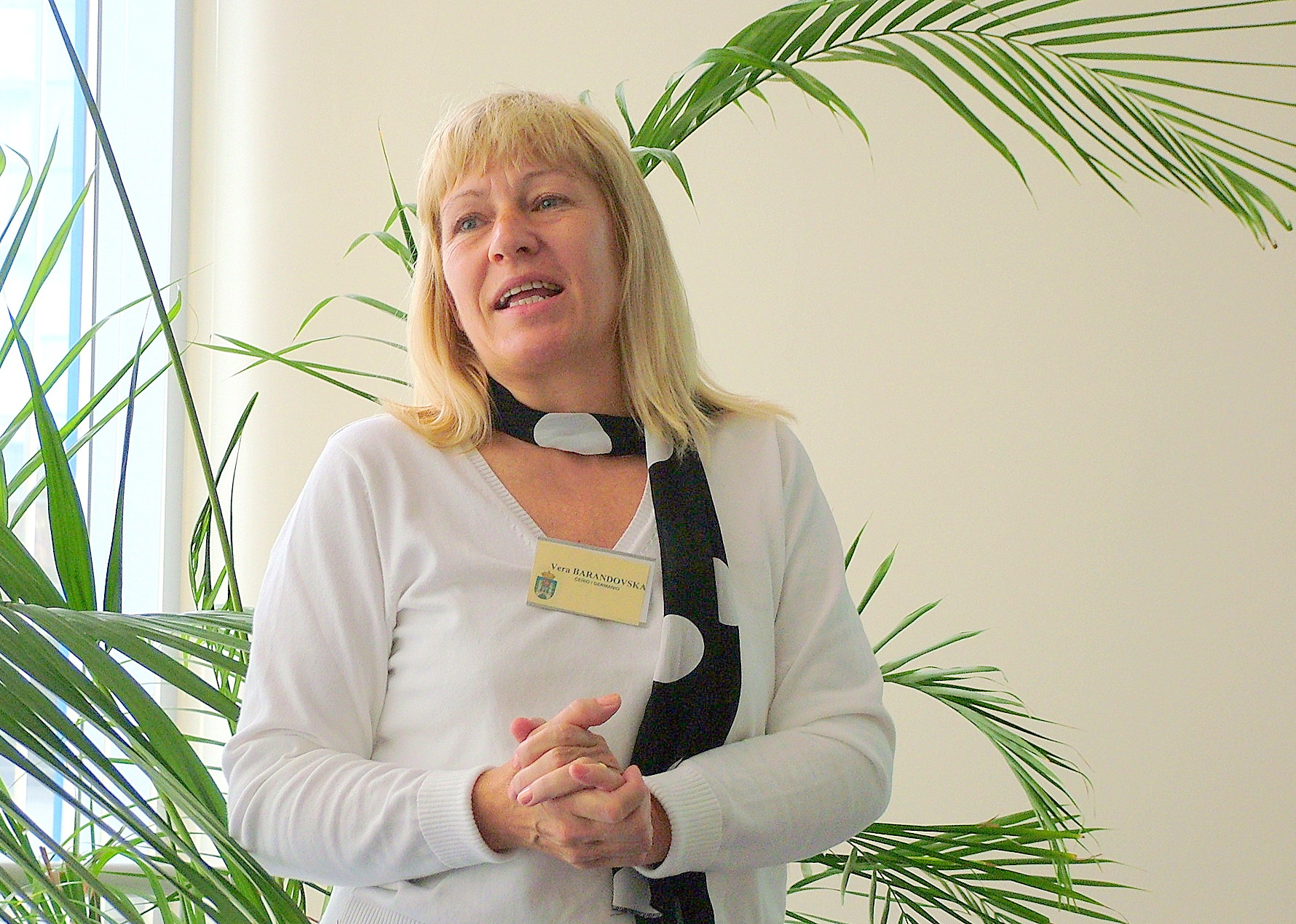 Vera Barandovská-Frank, UAM Poznan